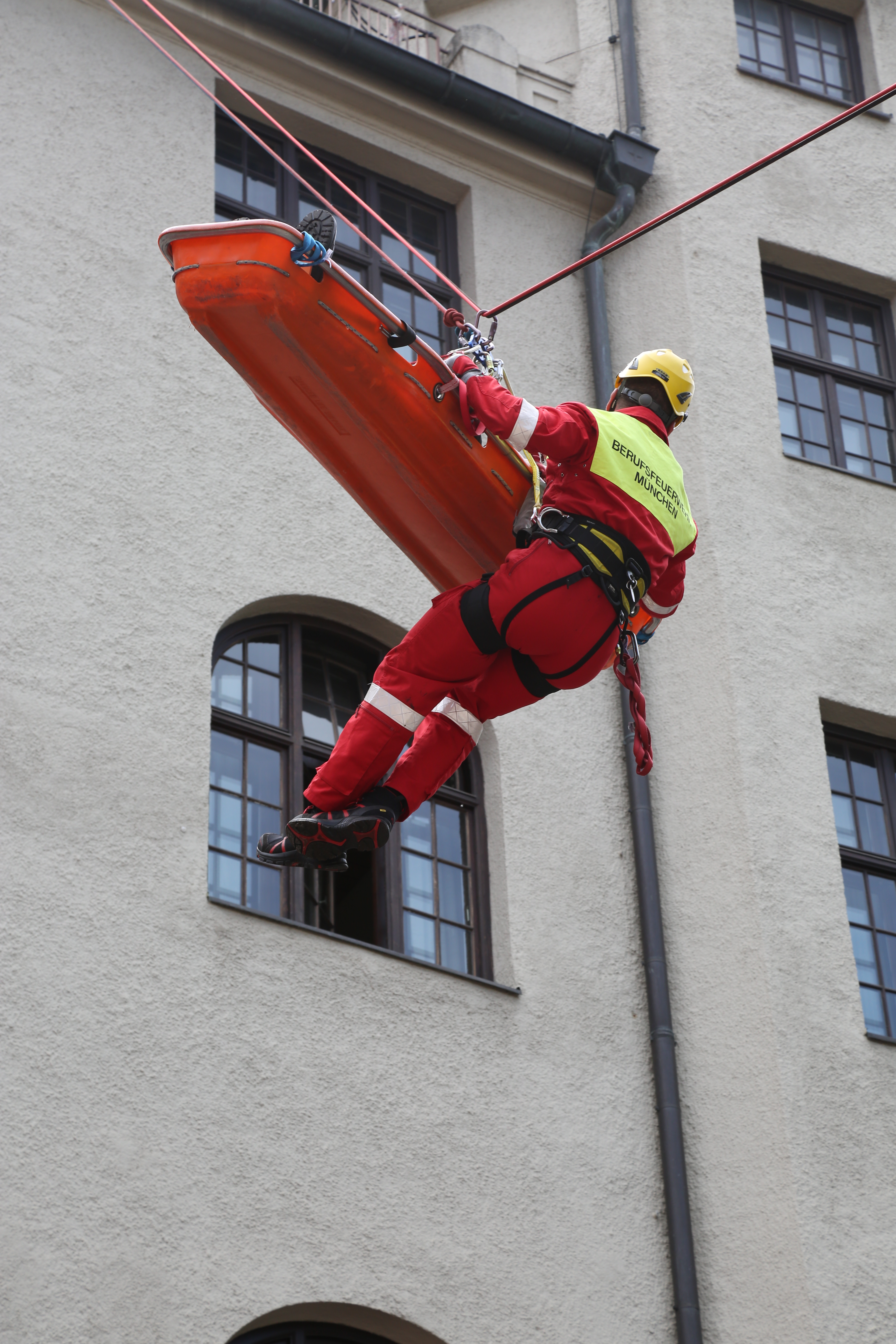 Übung der Münchner Berufsfeuerwehr, Höhenrettungsgruppe